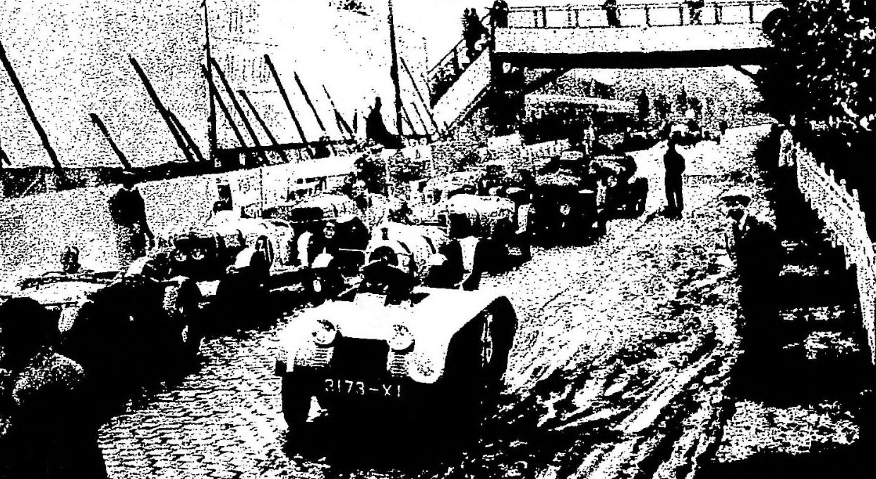 Le départ du Circuit des Routes Pavées en 1927.